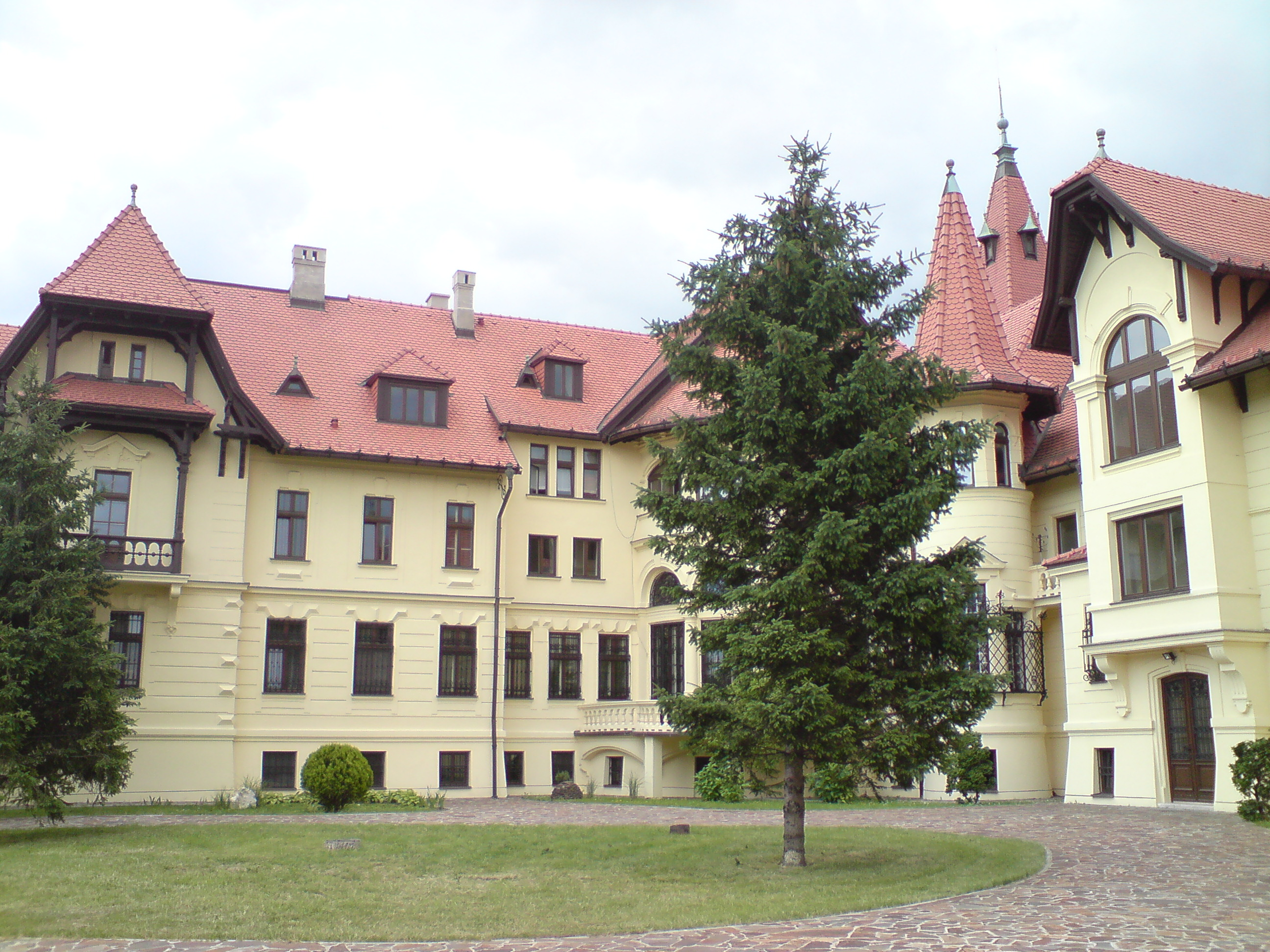 Csákyho kaštieľ v Prievoze